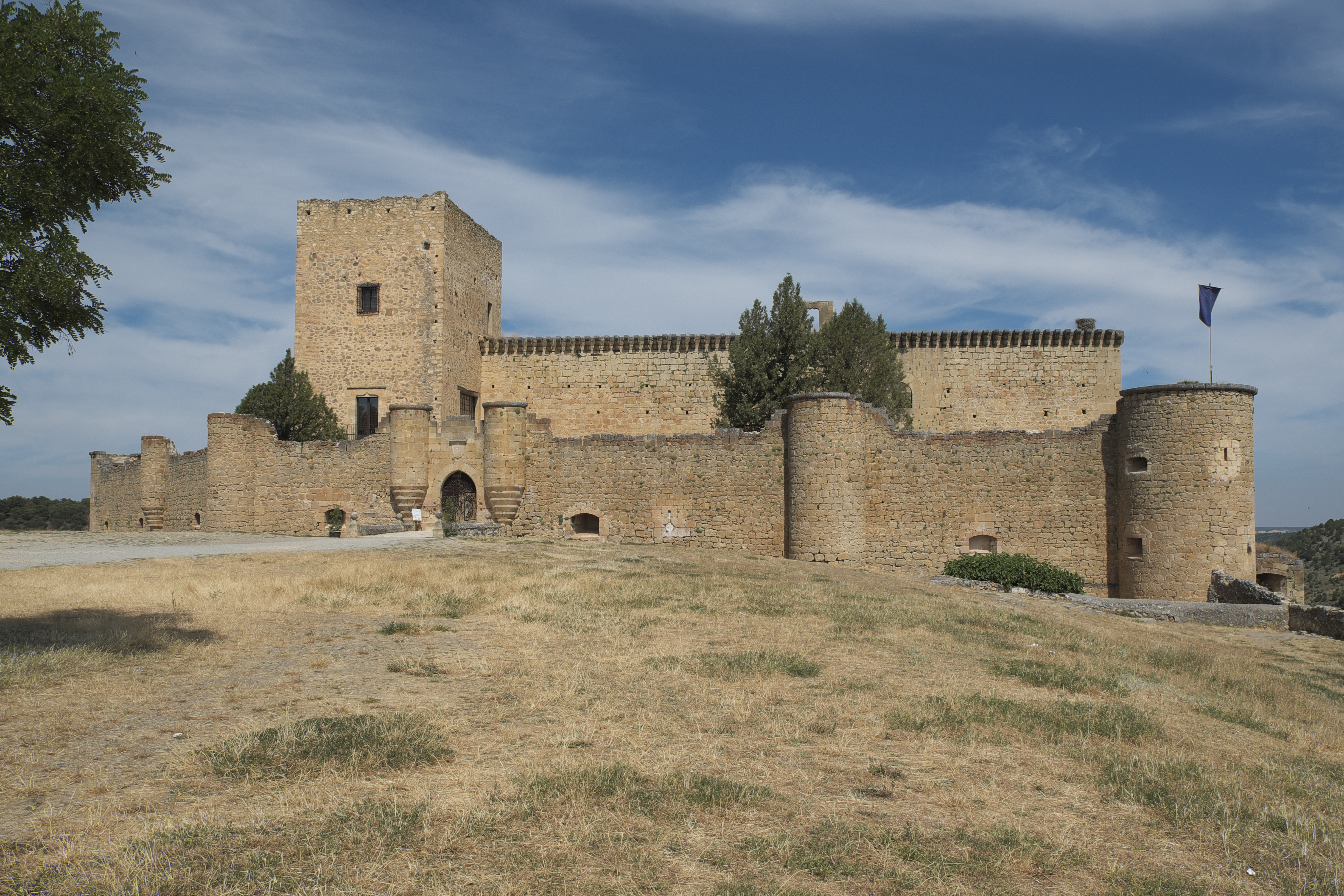 Burg Pedraza in Pedraza in der Provinz Segovia (Kastilien und León/Spanien)